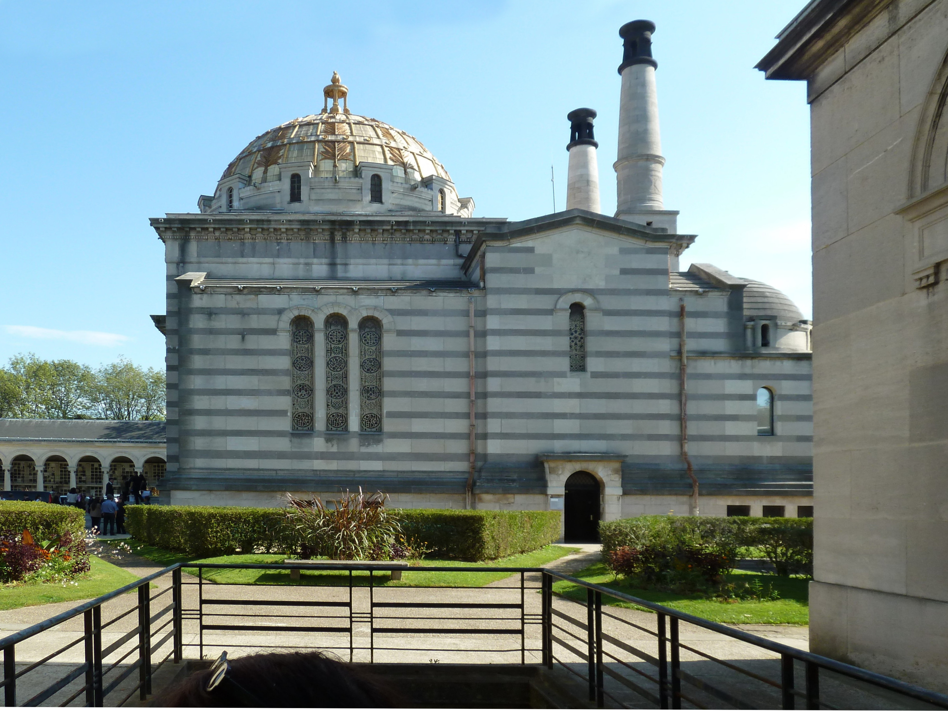 le Crematorium du cimetière du Père-Lachaise in Paris .